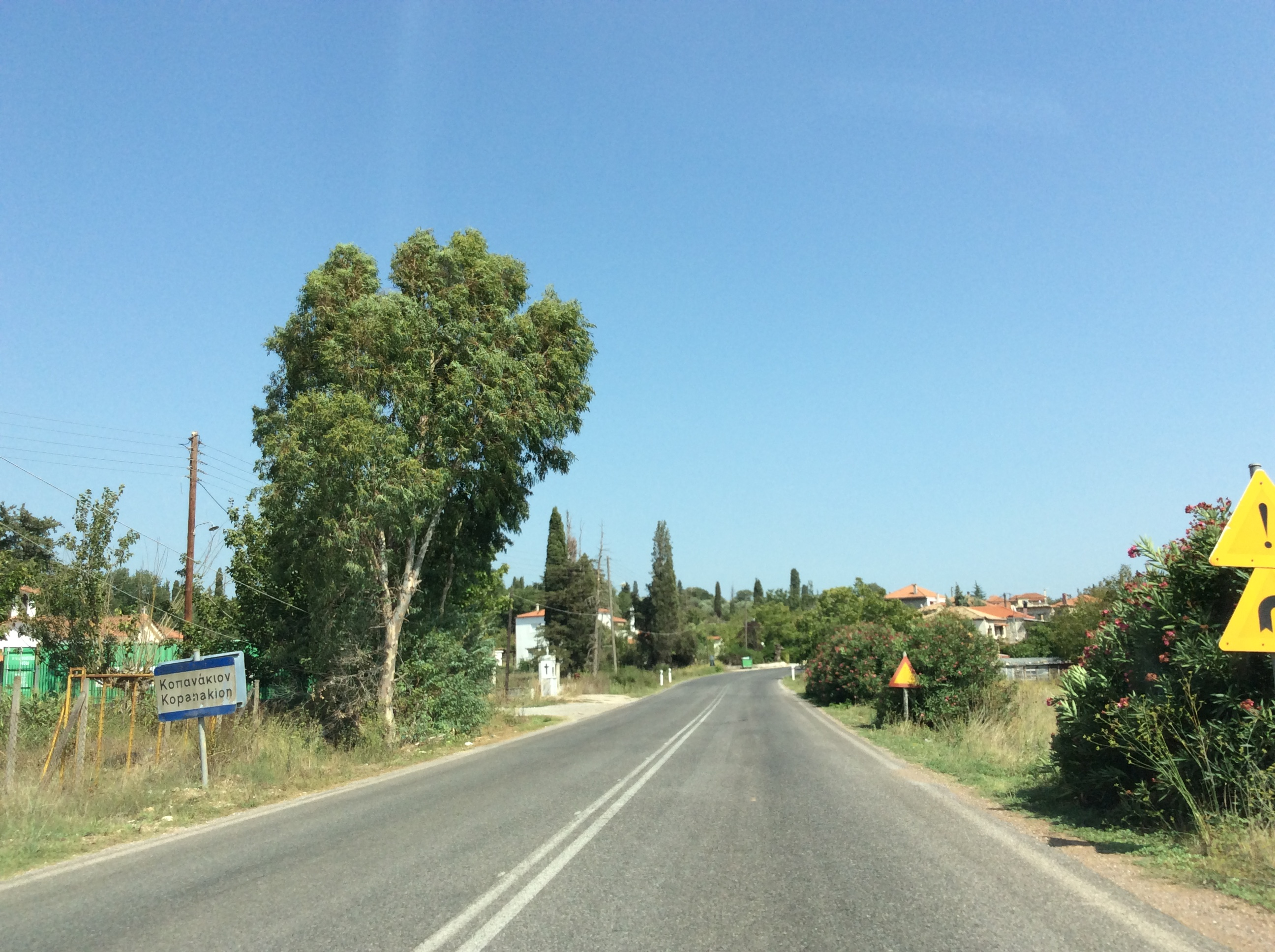 Κοπανάκι Μεσσηνίας. Δυτική είσοδος από την οδό Καλού Νερού - Αλλαγής.